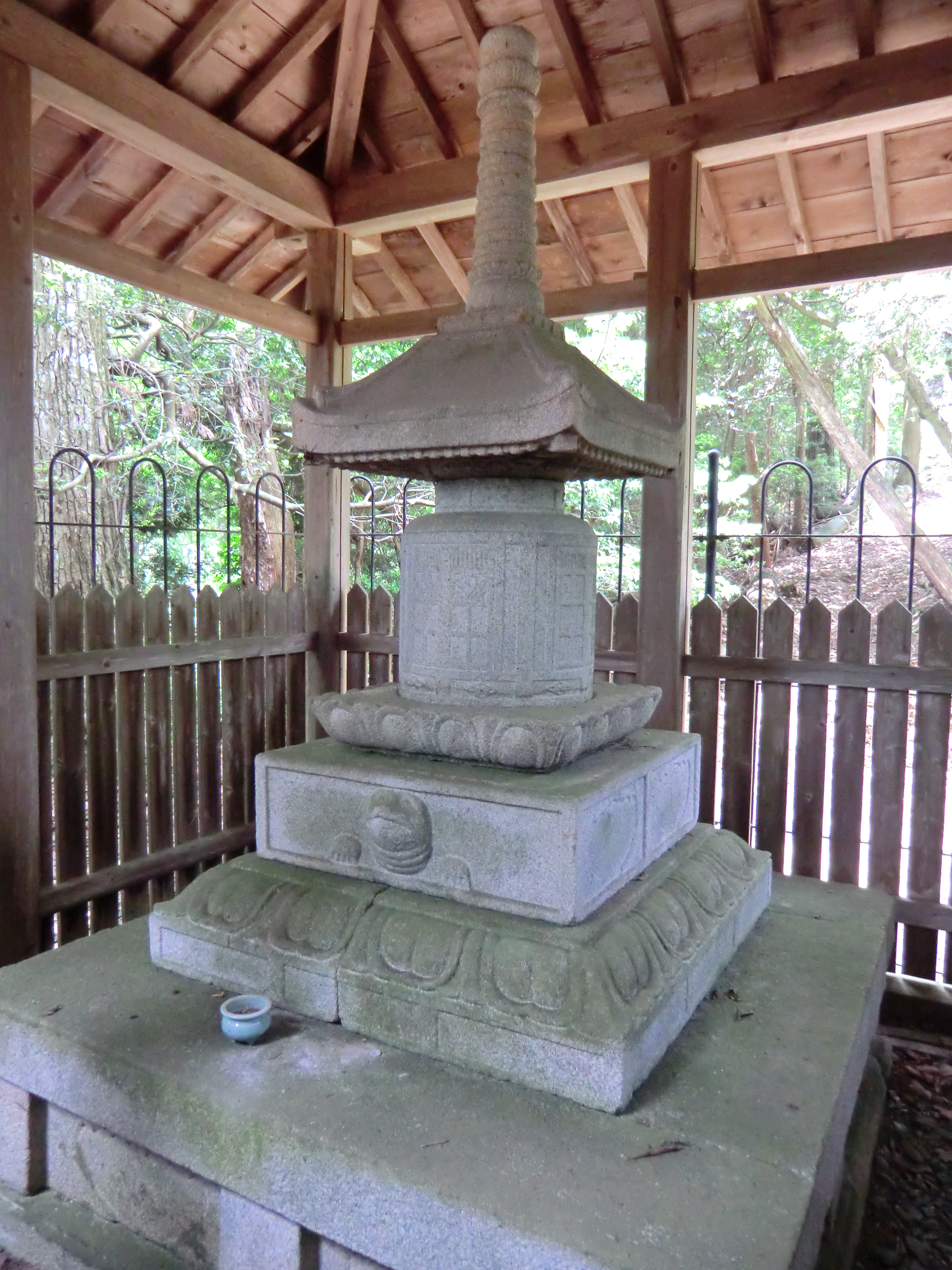 百貝岳にある聖宝理源大師の廟塔（重要文化財・鳳閣寺廟塔）